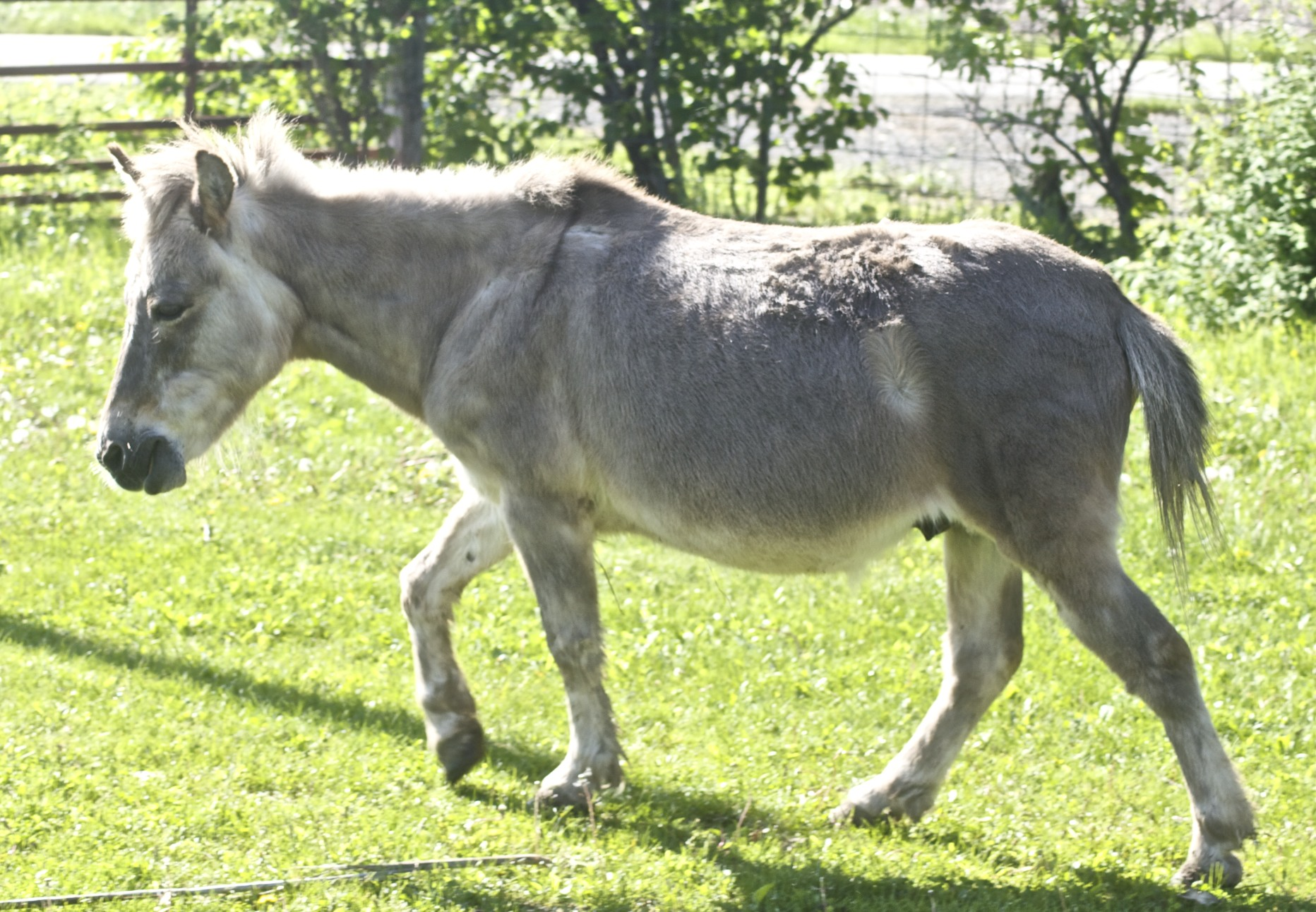 Hinny